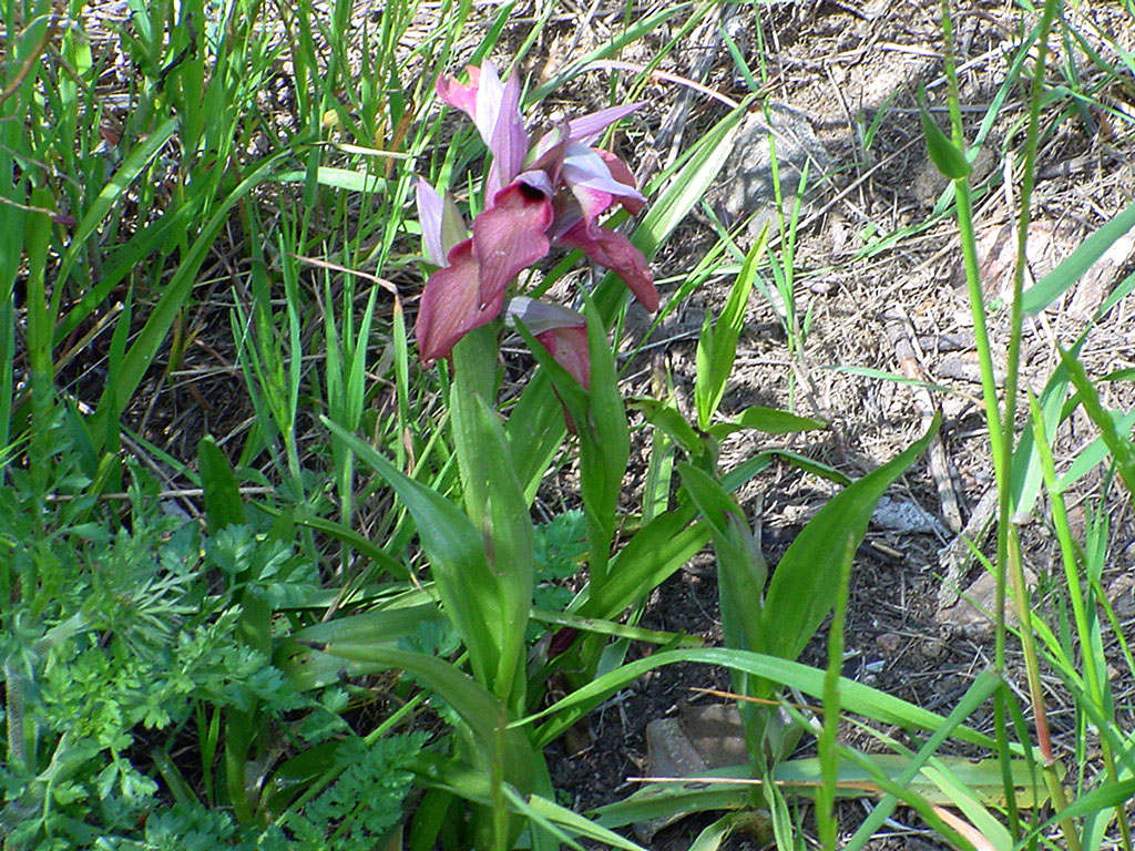 Serapias neglecta, Sérapias (Serapias sp.)